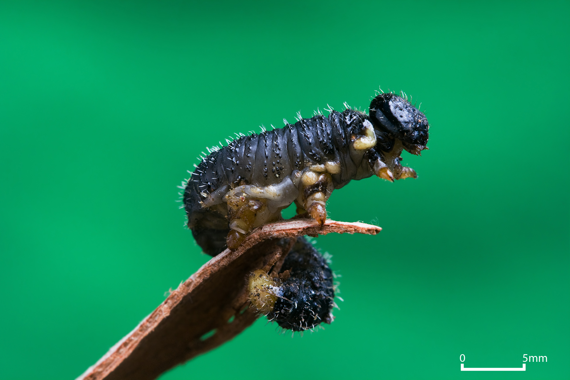 1.2 only